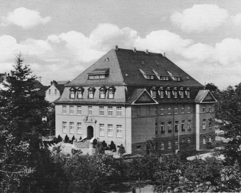 Hauptgebäude in den 1920er Jahren